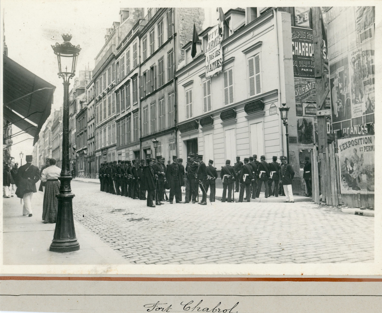 Le Fort Chabrol. (Cliché de M. le capitaine S...)